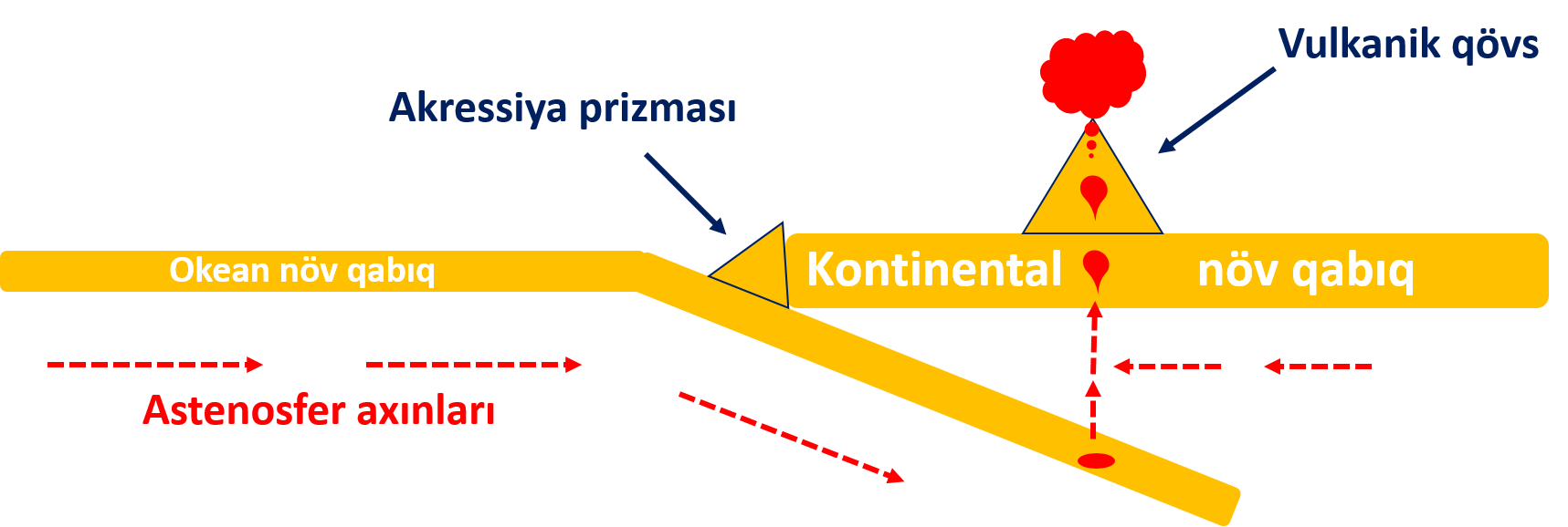 Subduksiya zonası və onun elementləri